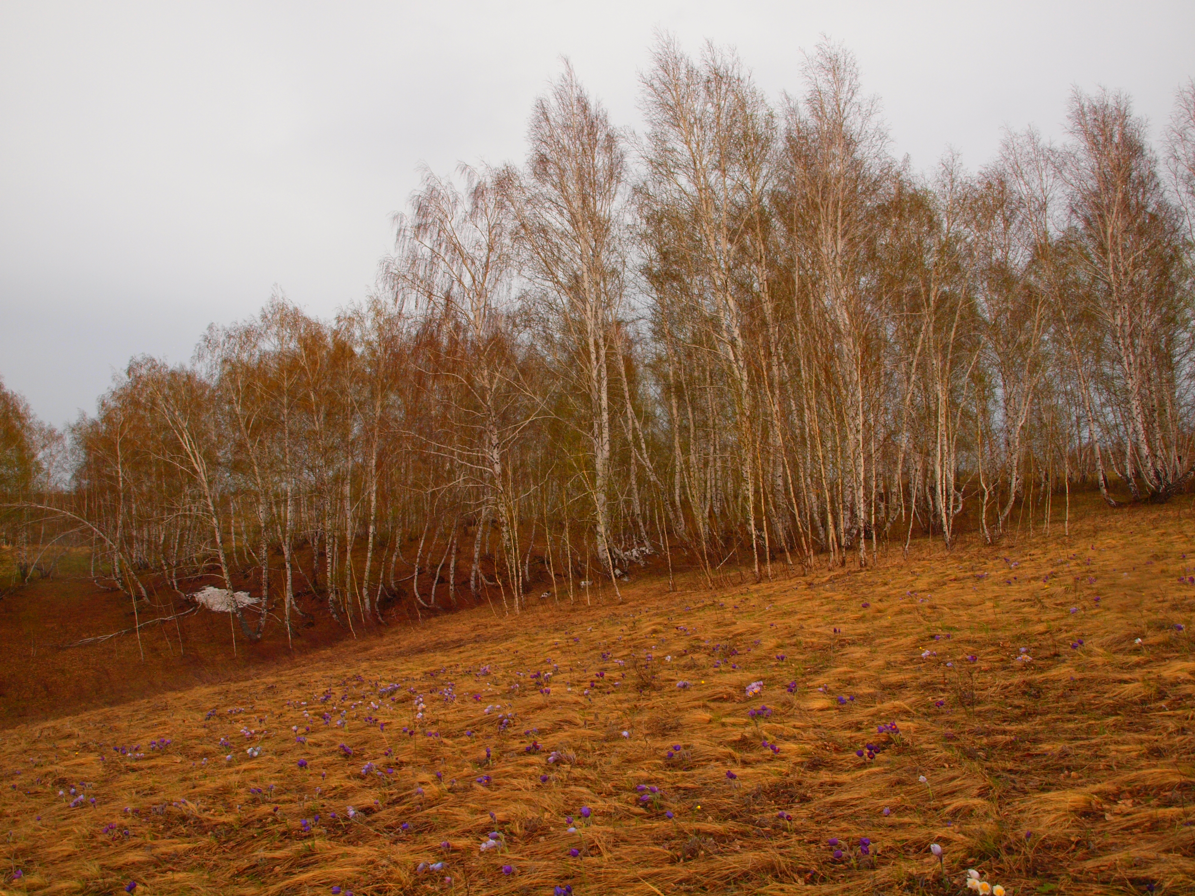 Участок дубово-березового леса, Миякинский район This image is related to the protected area of Russia number 0210187